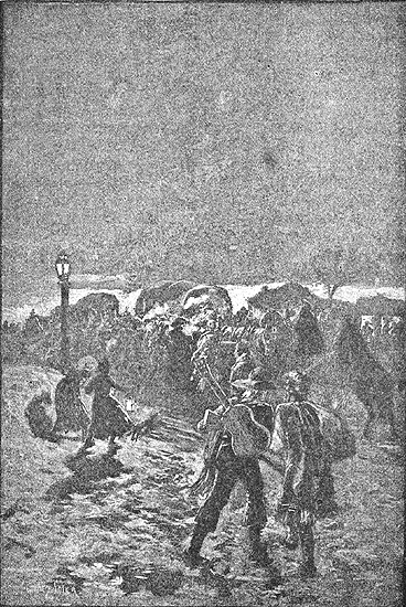 Ilustración de El terror de 1824 de Benito Pérez Galdós. Ilustradores: Gómez Soler y Pellicer. Madrid, Administración de La Guirnalda y Episodios Nacionales, 1885.